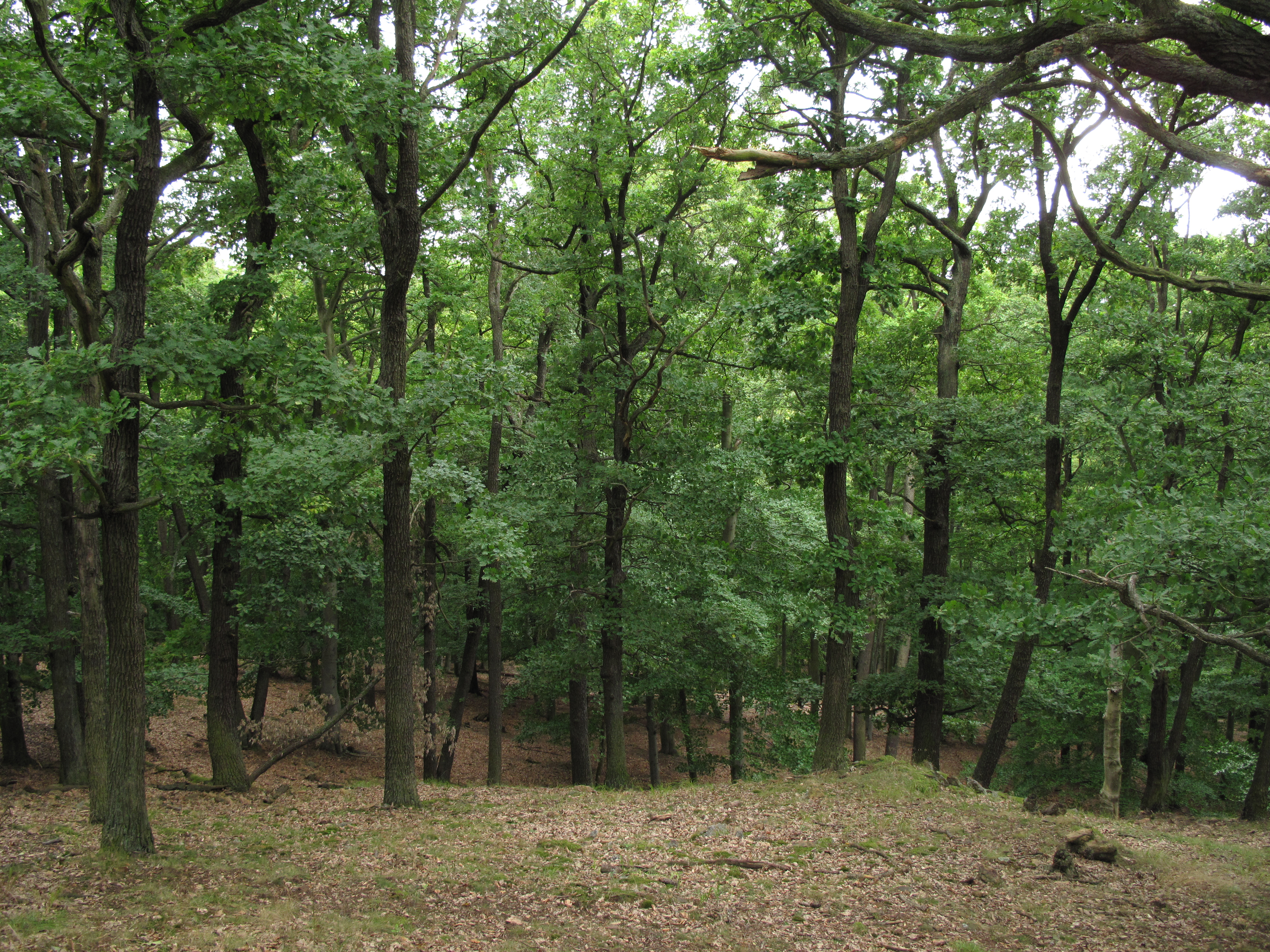 Doubrava v národní přírodní rezervaci Velká Pleš. Okres Rakovník, Česká republika.